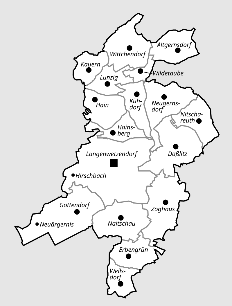 Die ab 2014 gültige Gemeindegliederung von Langenwetzendorf.